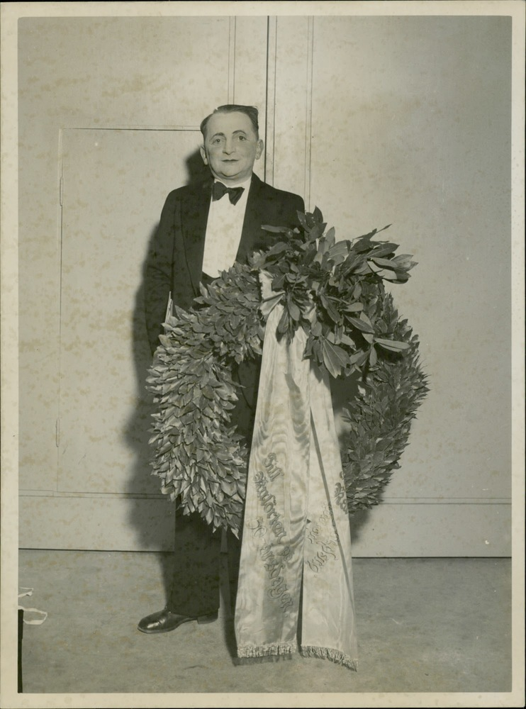 Baksidestext: "Kulörten som på sin 50 årsdag [sic] blev föremål för hjärtliga hyllningar. Här ses han med sin lagerkrans som han fått mottaga av Karl - Gerhard [sic]."